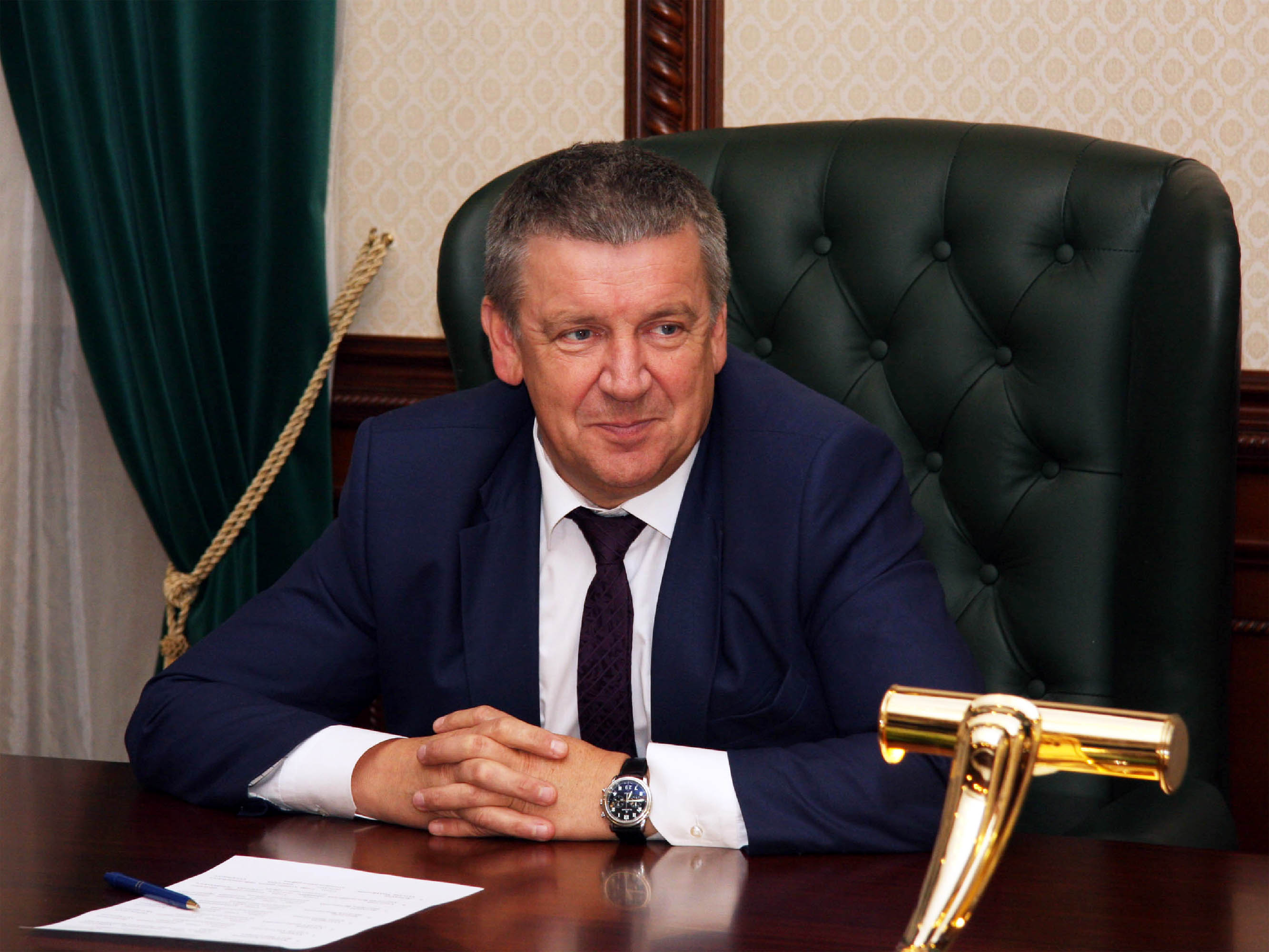 Александр Худилайнен в Правительстве Республики Карелия